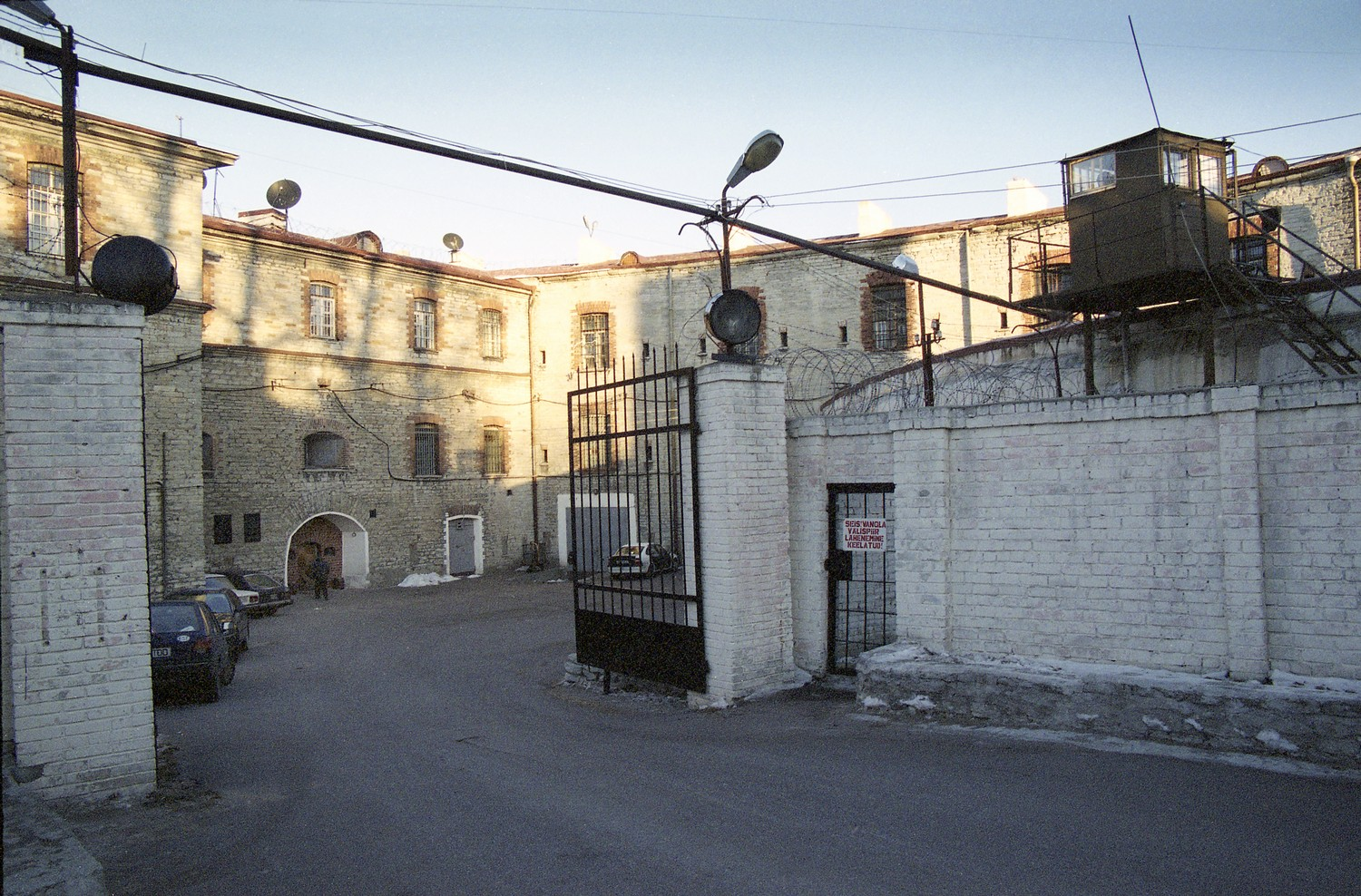 Patarei vangla 2002 (01)